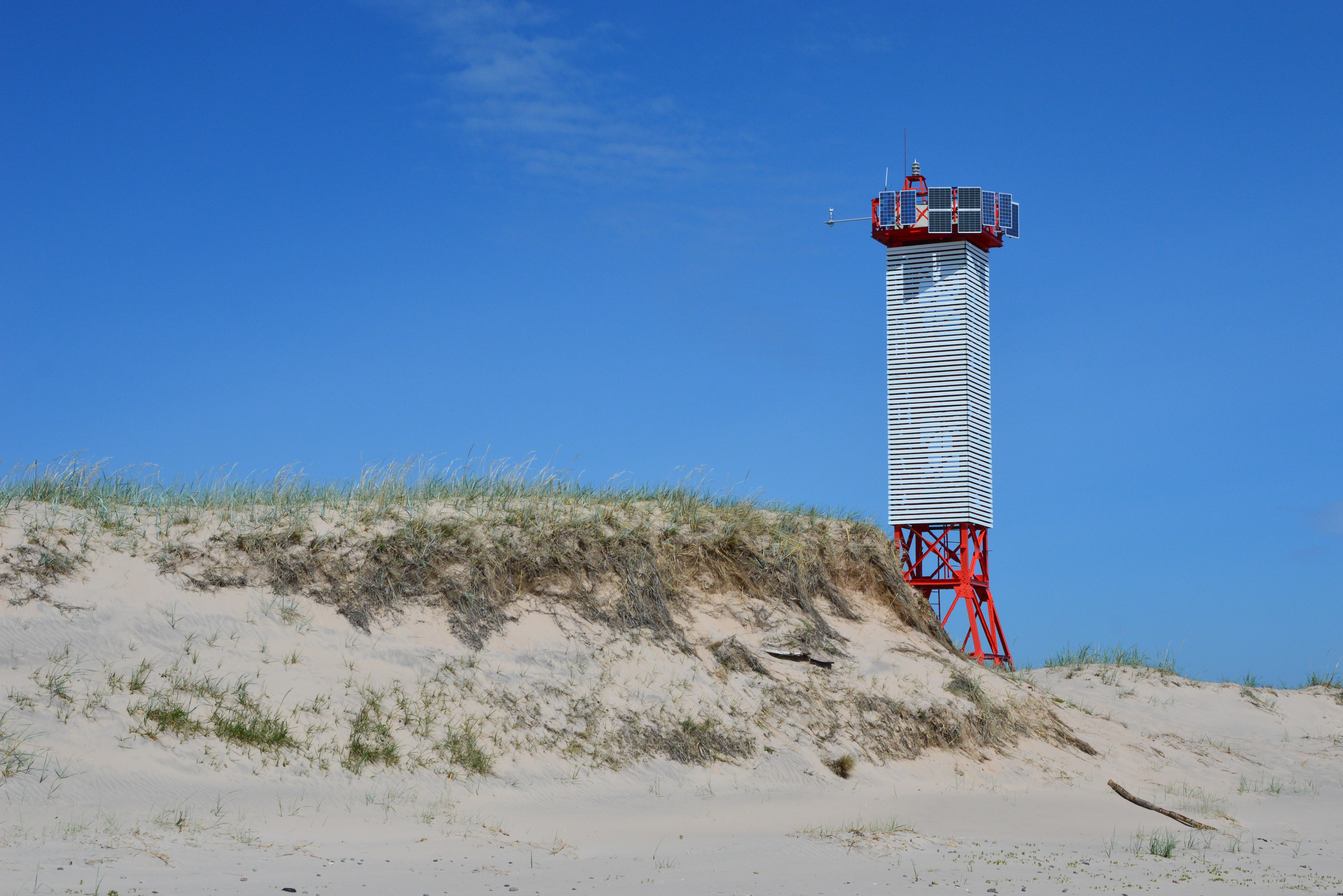 Hülkari tulepaak Naissaarel.